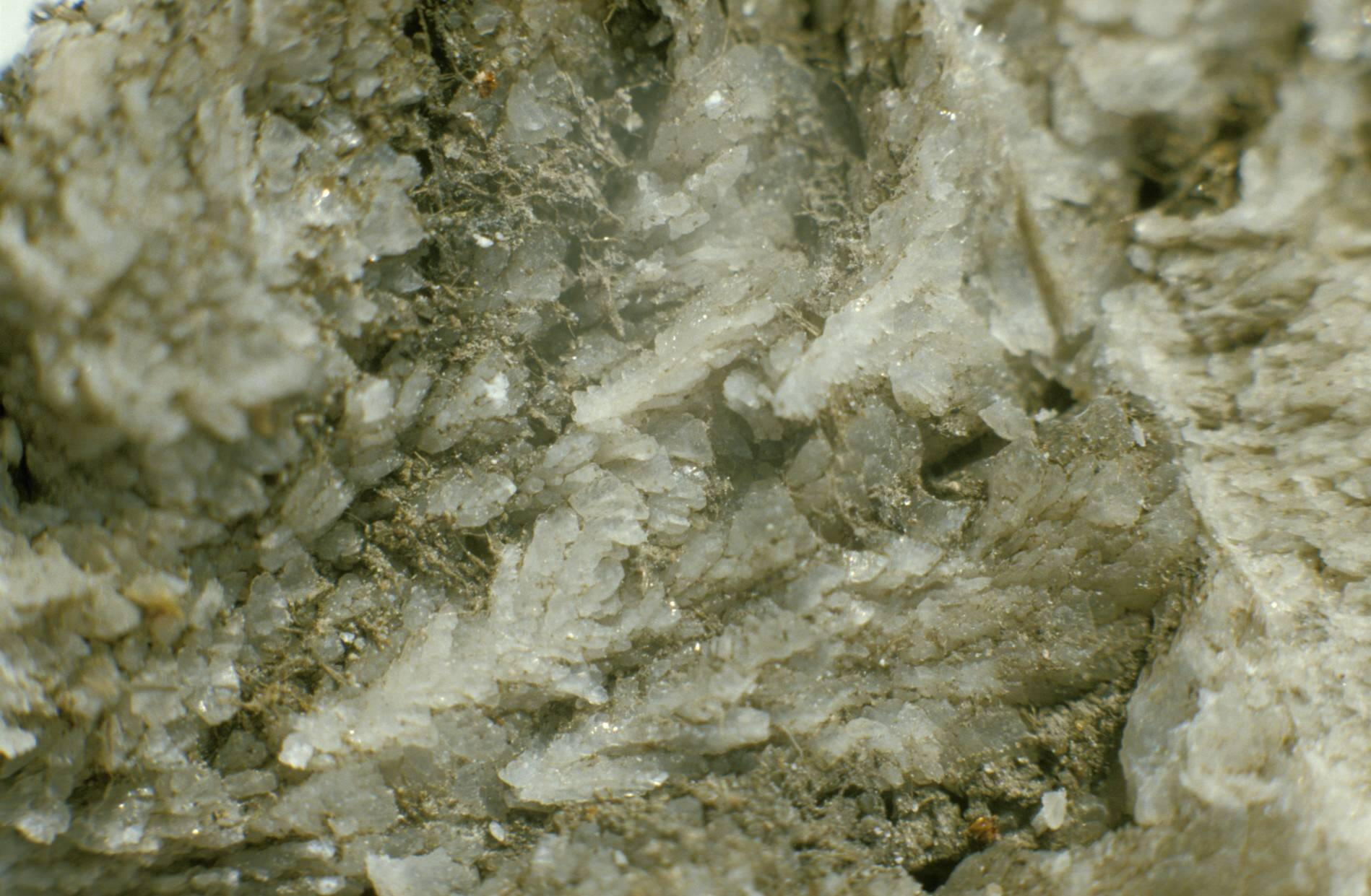 Struvit aus einem Faulbehalter der Kläranlage Hannover-Herrenhausen, Bildbreite: 30 mm